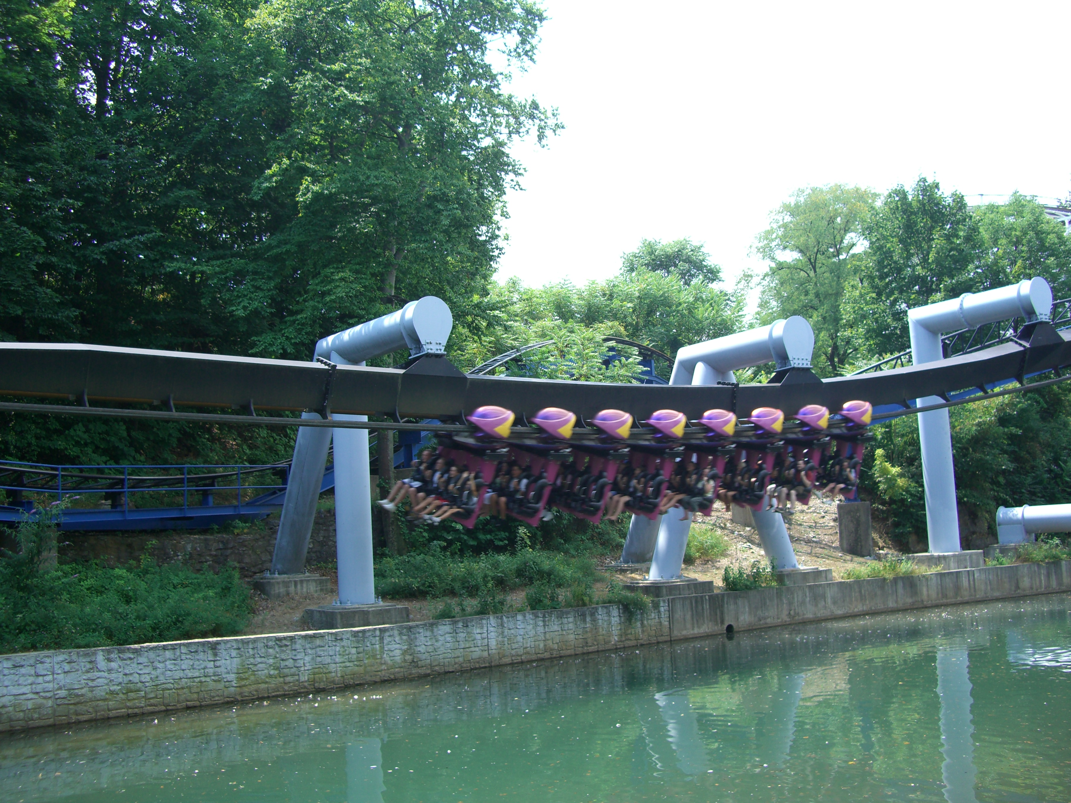 Great Bear , montagnes russes à Hersheypark